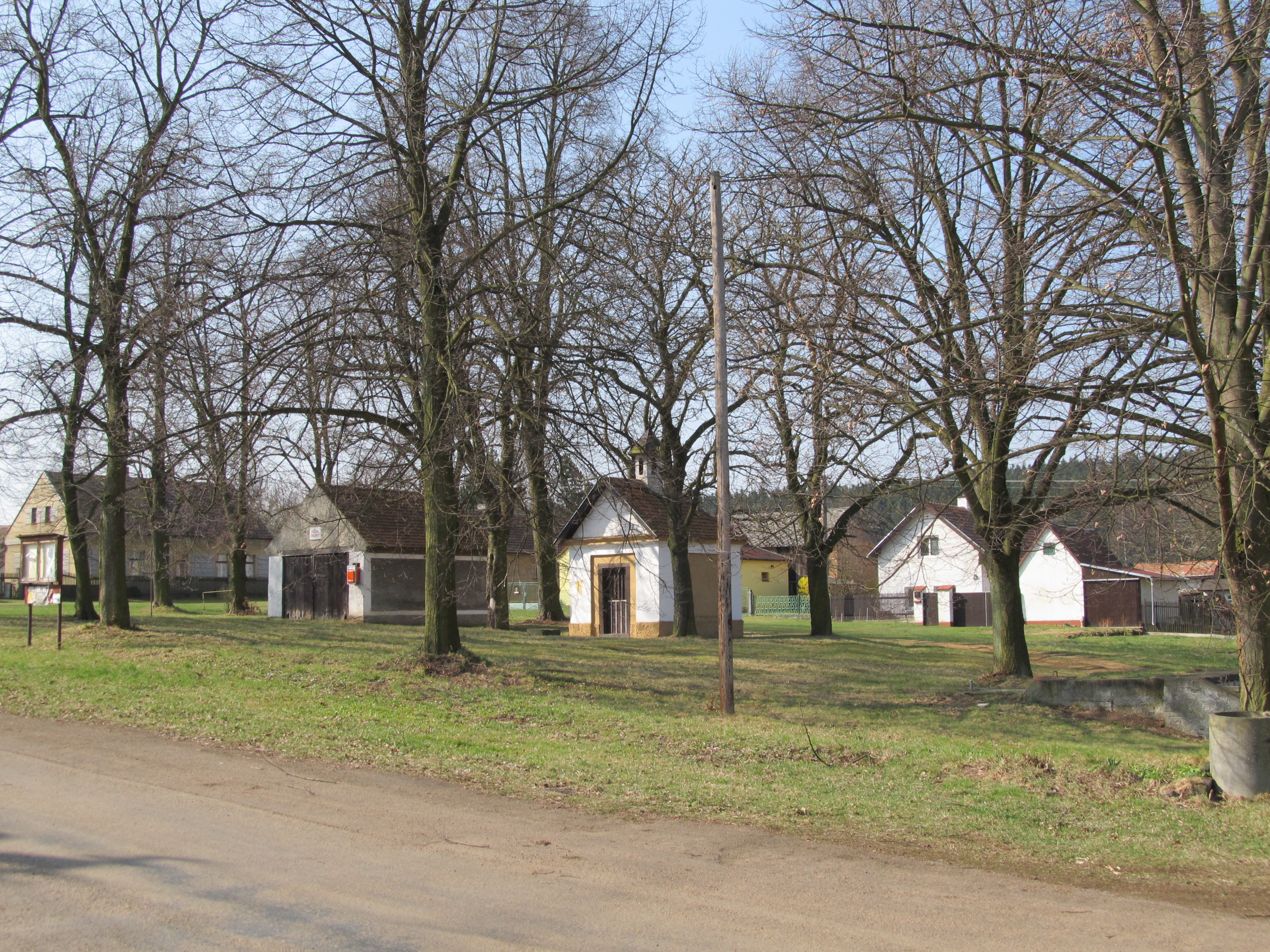 Bílá Skála - náves